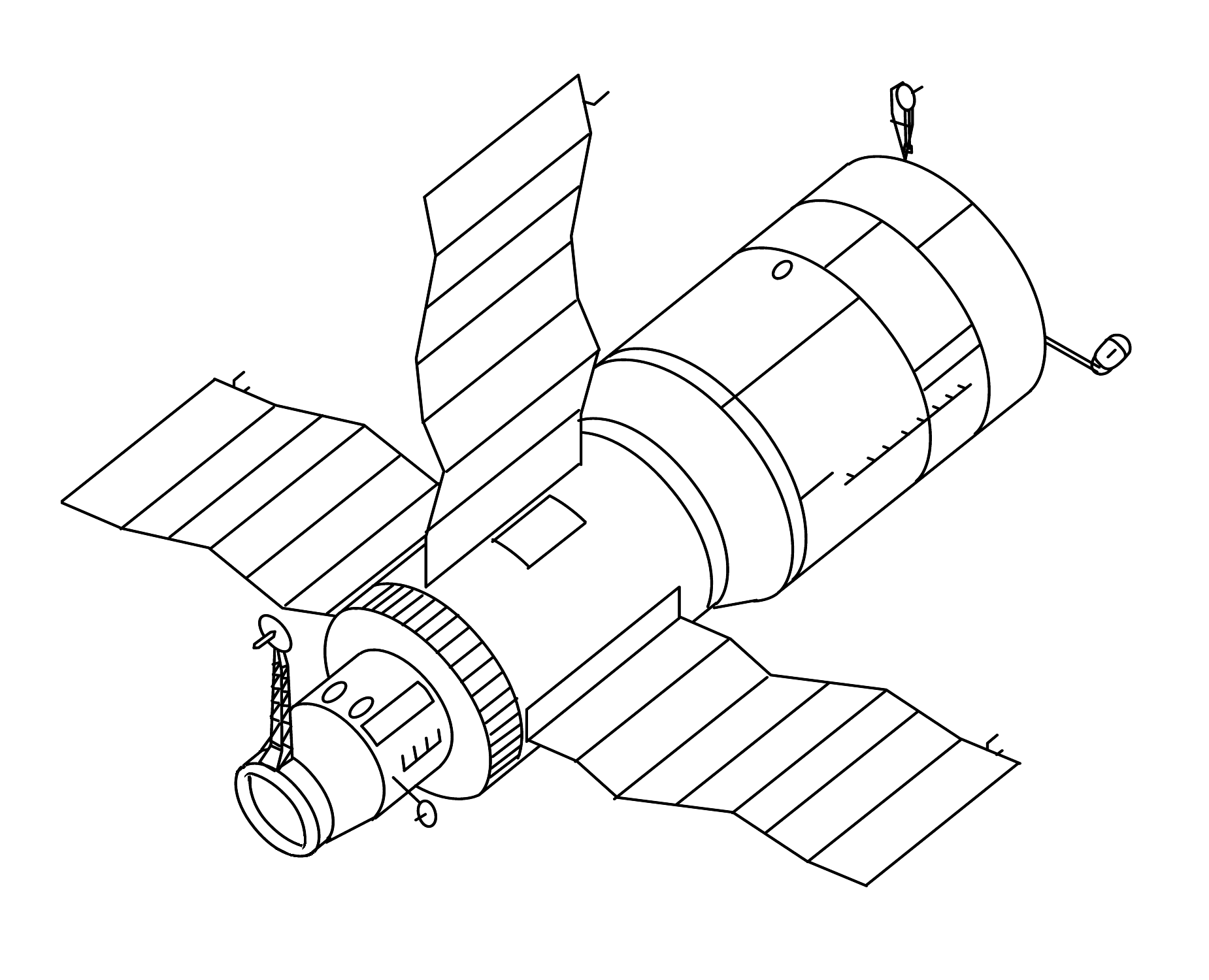 Recorte de File:Salyut 7 and Cosmos_1686_drawing.png